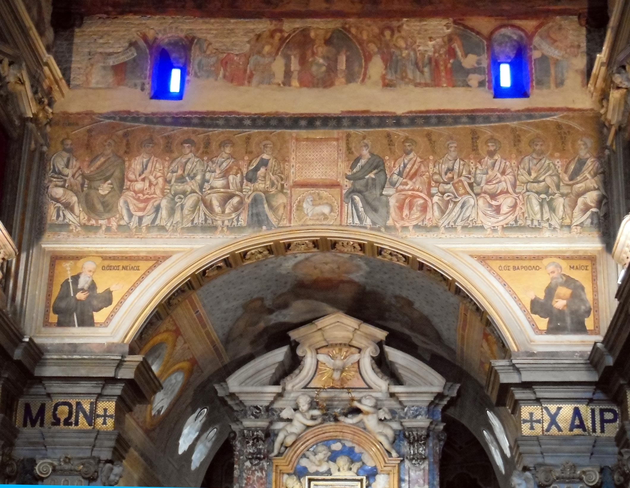 Italia, Lazio, provincia di Roma, Grottaferrata, abbazia territoriale di Santa Maria (abbazia di San Nilo), chiesa, interno, mosaici sopra l'arco trionfale (Pentecoste) e affreschi del Duecento con la Trinità